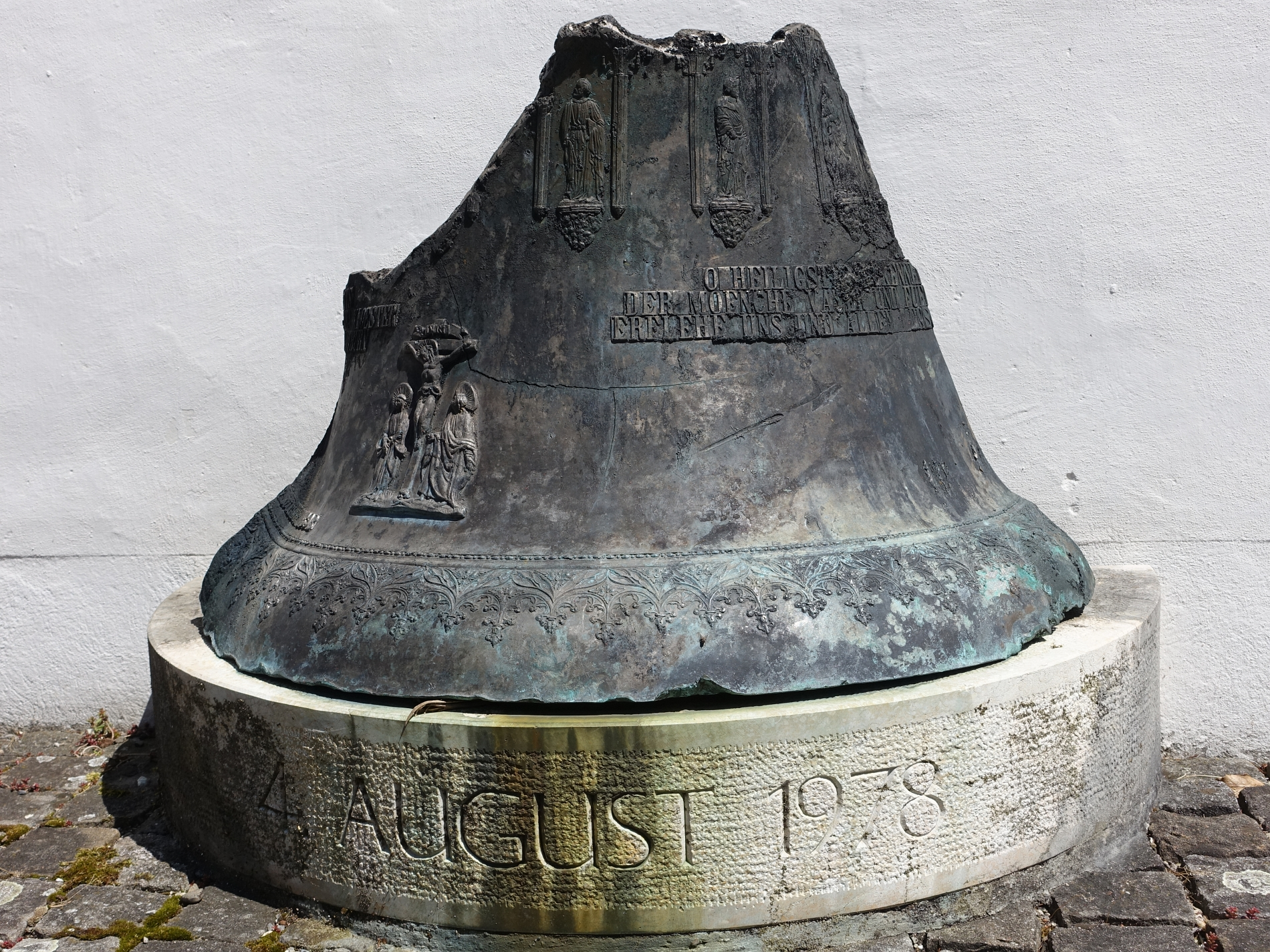 Kloster Beinwil, Solothurn, Schweiz